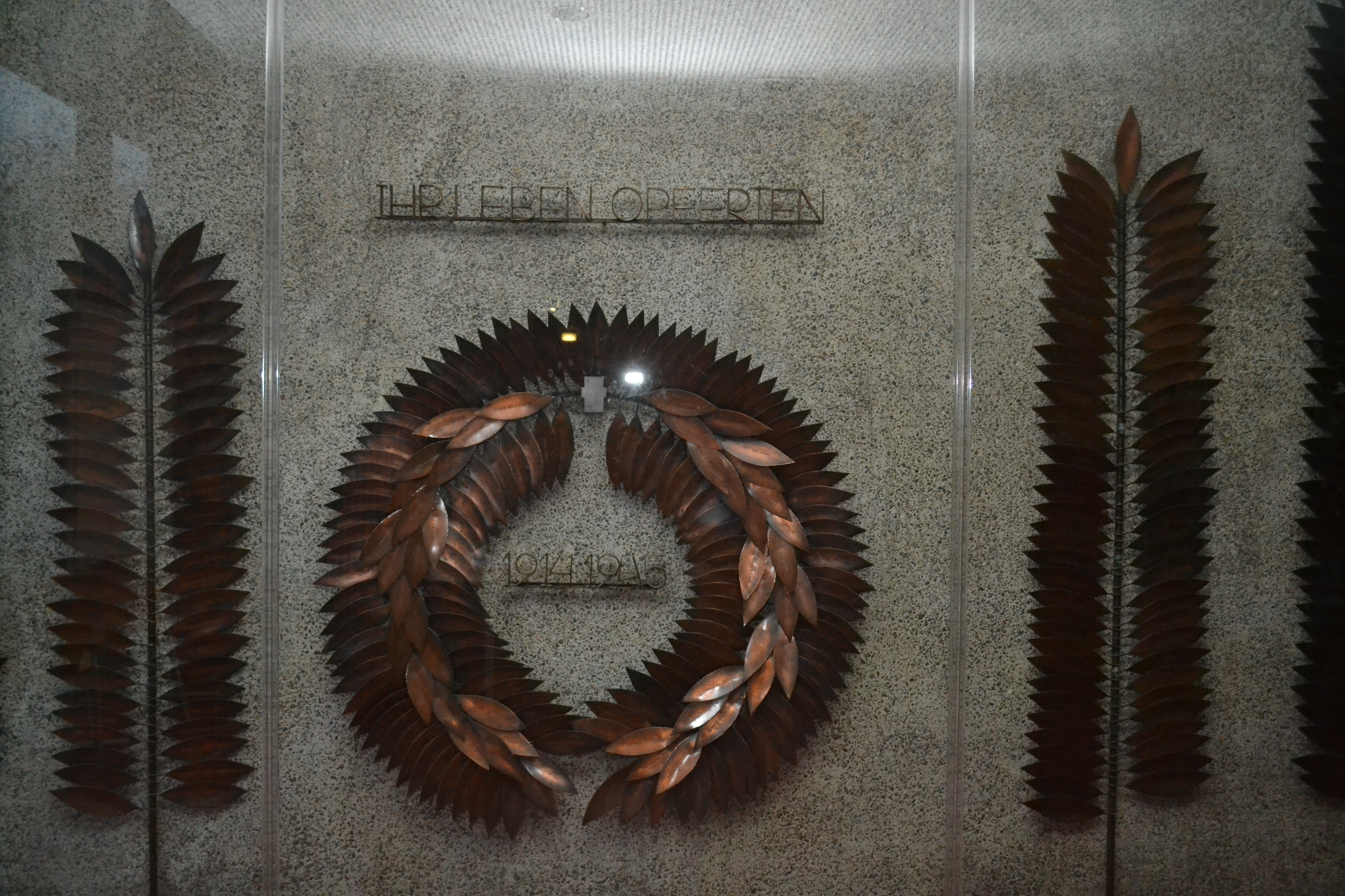 Bronzearbeit "Mahnmal für die Opfer der beiden Kriege" Entwurf: Ivo Beucker, Ausführung Ferdi Walther (1958) Treppenhaus des Humboldt-Gymnasiums Düsseldorf